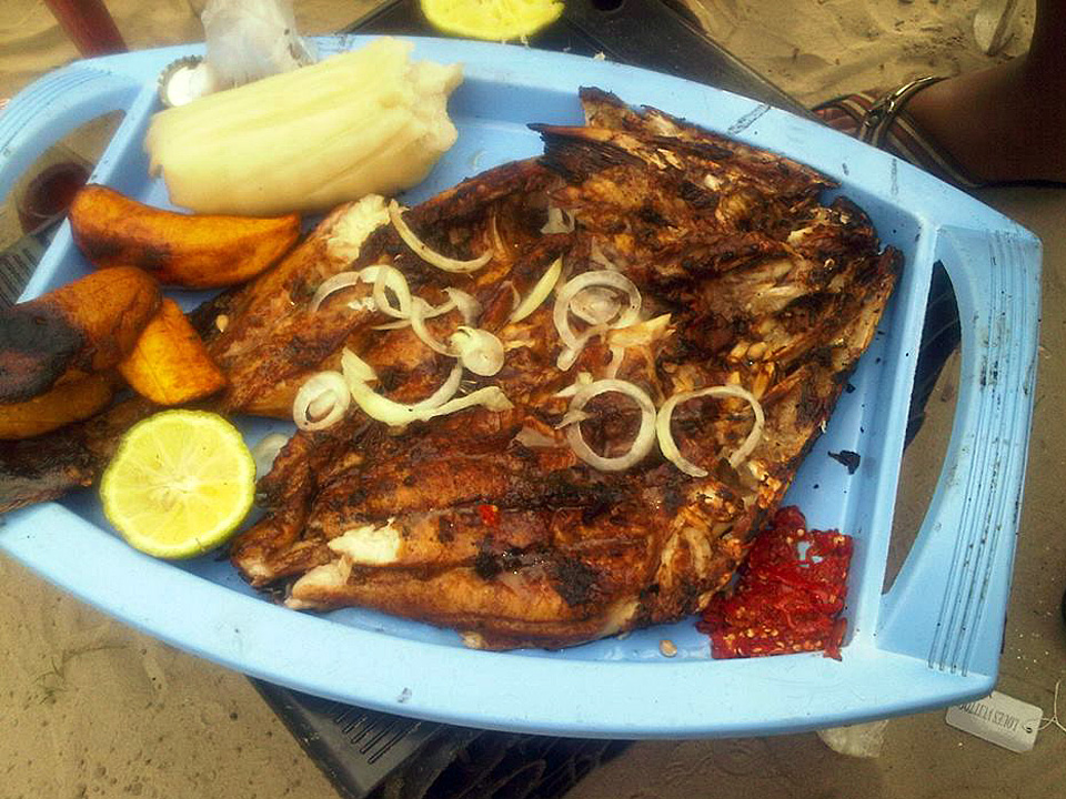 Poisson (Malangwa) braisé accompagné de banne plantain grillé et chikwangue. Plat populaire et typique dans les bistrots au bord du fleuve (Kinkole & Maluku) This is an image of food from Democratic Republic of the Congo